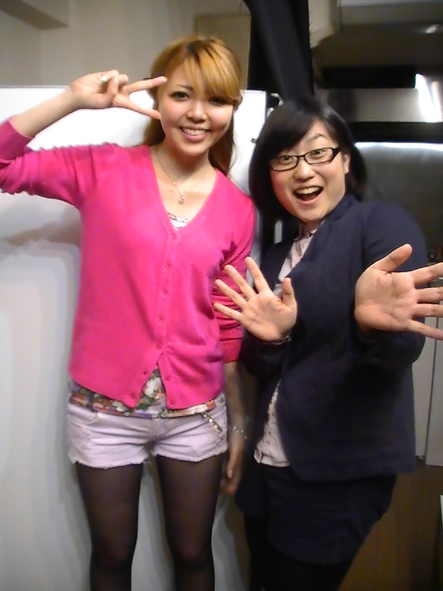 ブラット (お笑いコンビ 2015年)